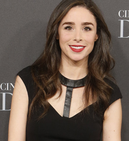 Candela Serrat en el estreno de "50 sombras de Grey"